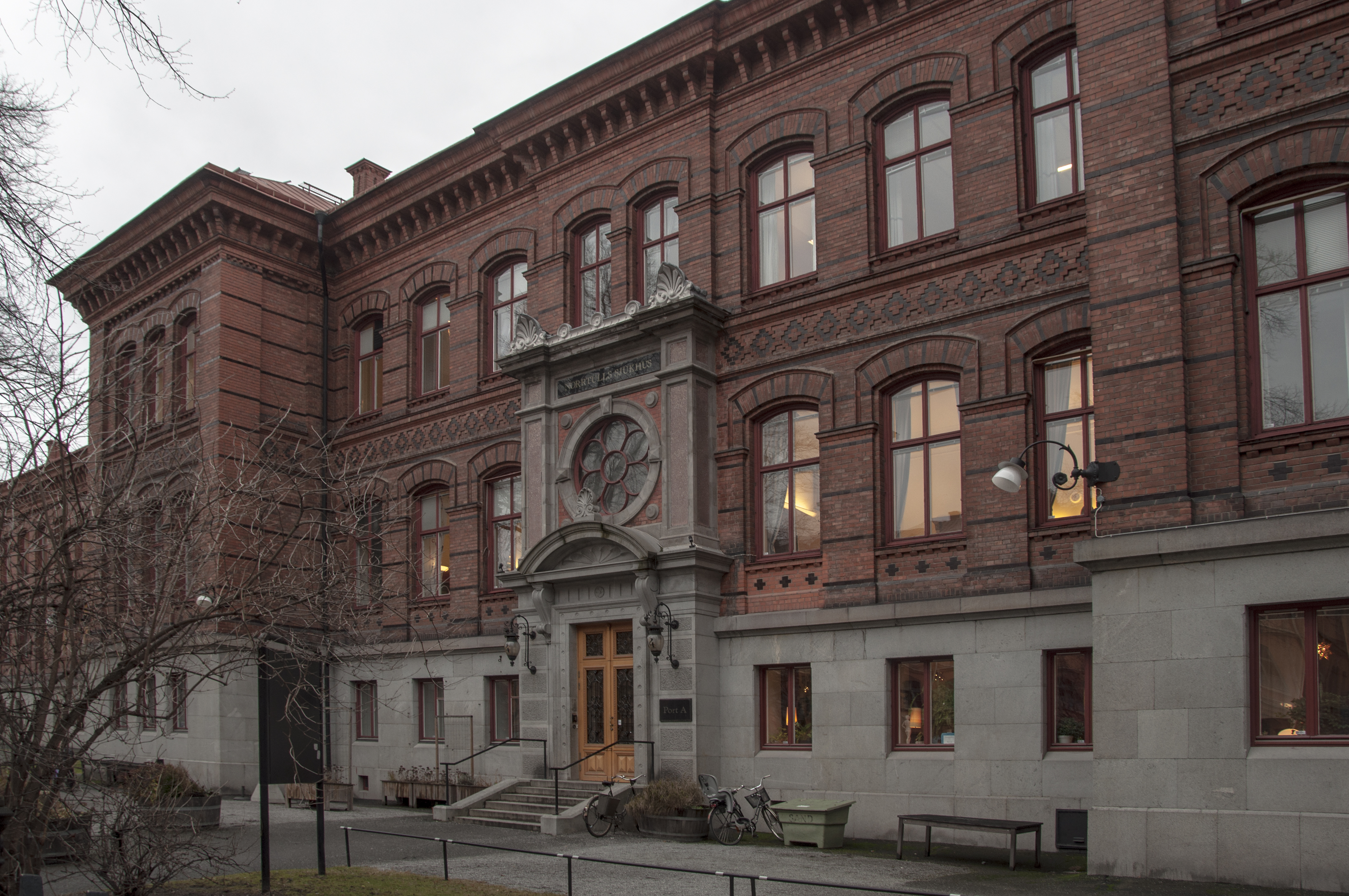 Norrtulls sjukhus, Nybyggnadsår 1880 - 1885 som Allmänna Barnhuset.Arktitekt: Frans Gustaf Abraham Dahl, Byggmästare:Andreas Gustaf Sällström